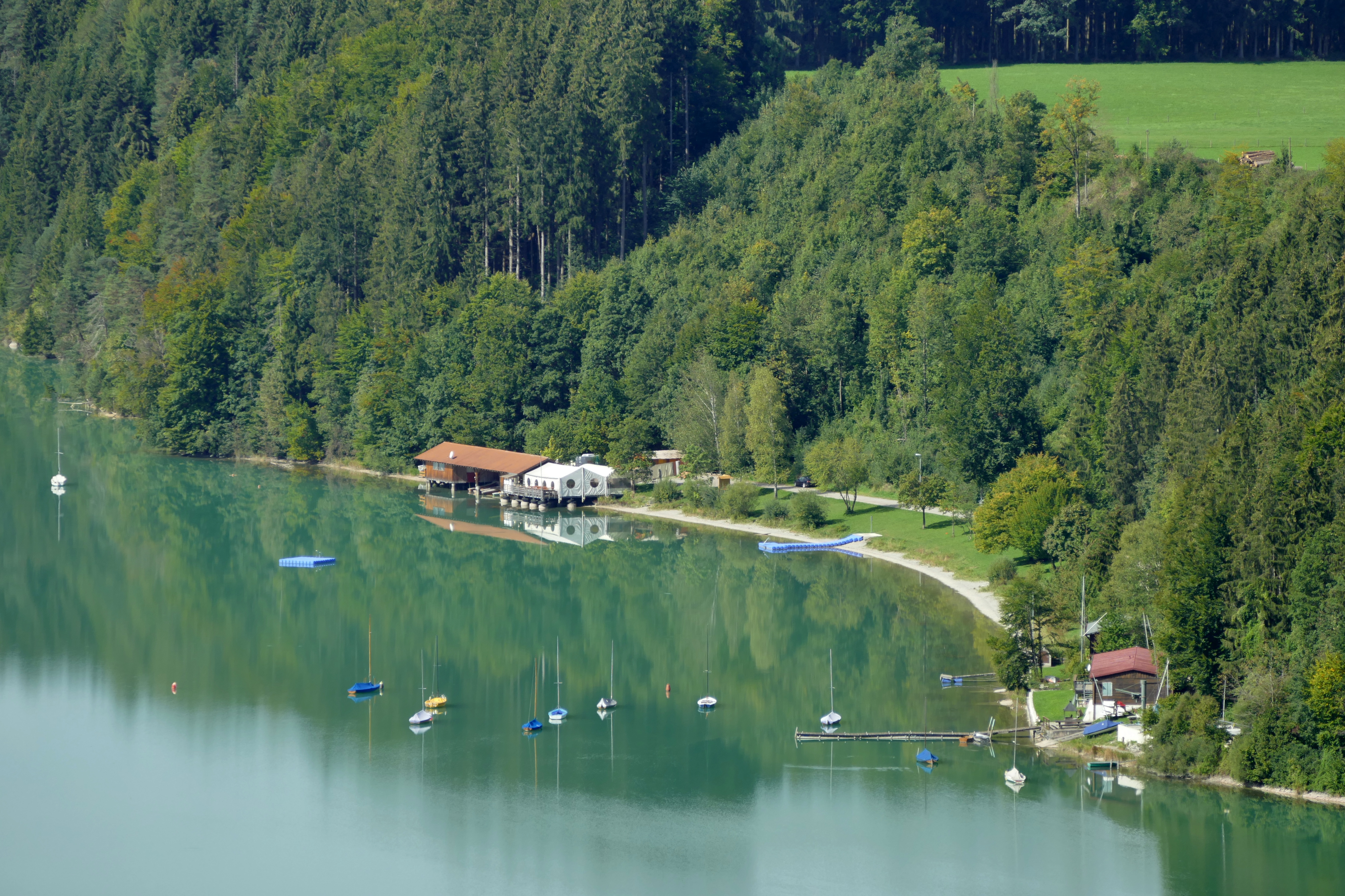 Restaurant und Freibad "Lido" am Nordufer des nordöstlichen Teiles der Lechstaustufe 6 auf Schongauer Gemeindegebiet, von Südosten her (von der Abbruchkante zum Lechtal auf Peitinger Seite nördlich Weinland) aus gesehen